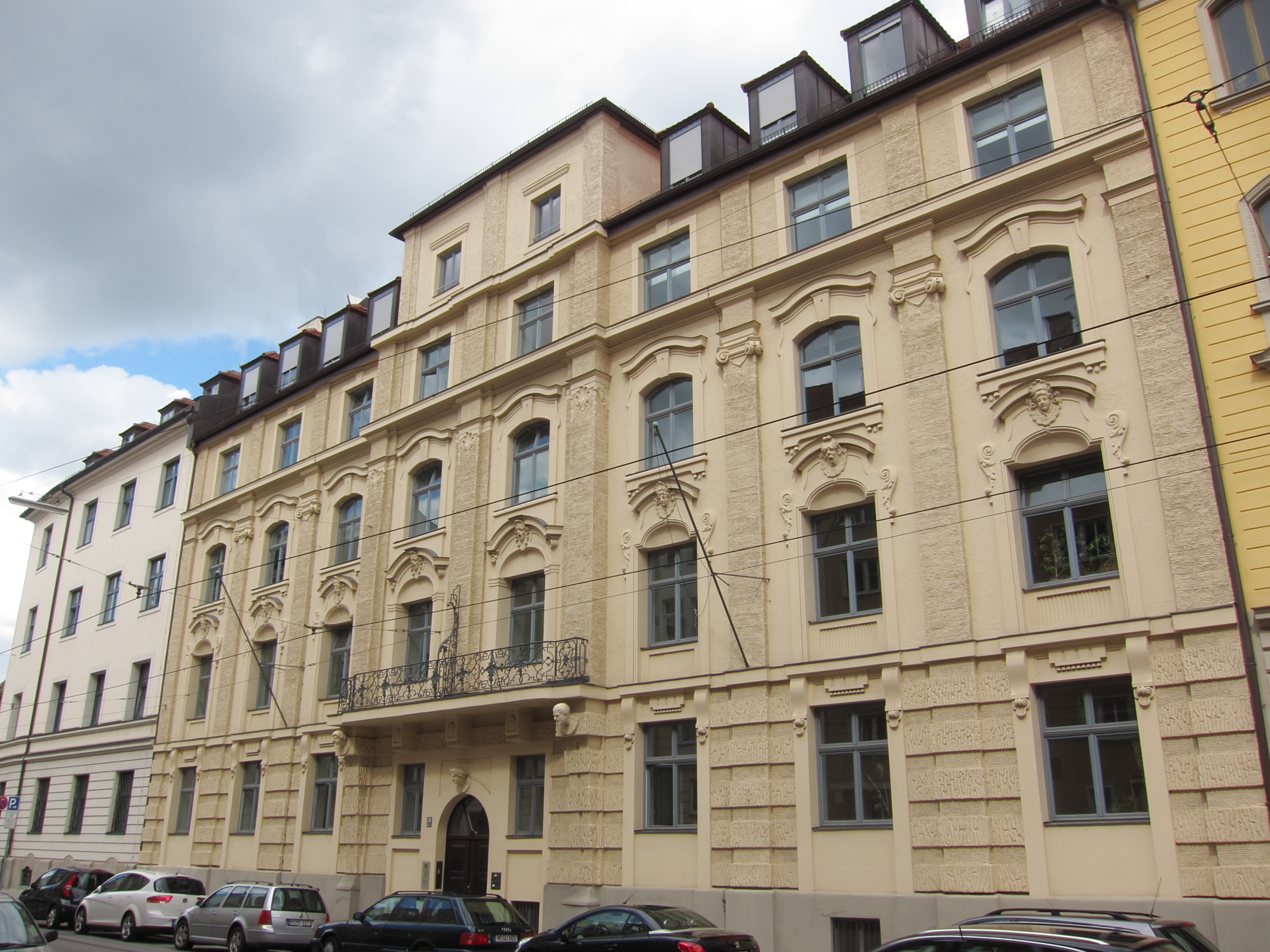 Wagmüllerstraße 20; Mietshaus, neubarock, reich gegliederte Fassade mit plastischem Dekor (Büsten, Masken), wohl 1897, von Emanuel von Seidl.